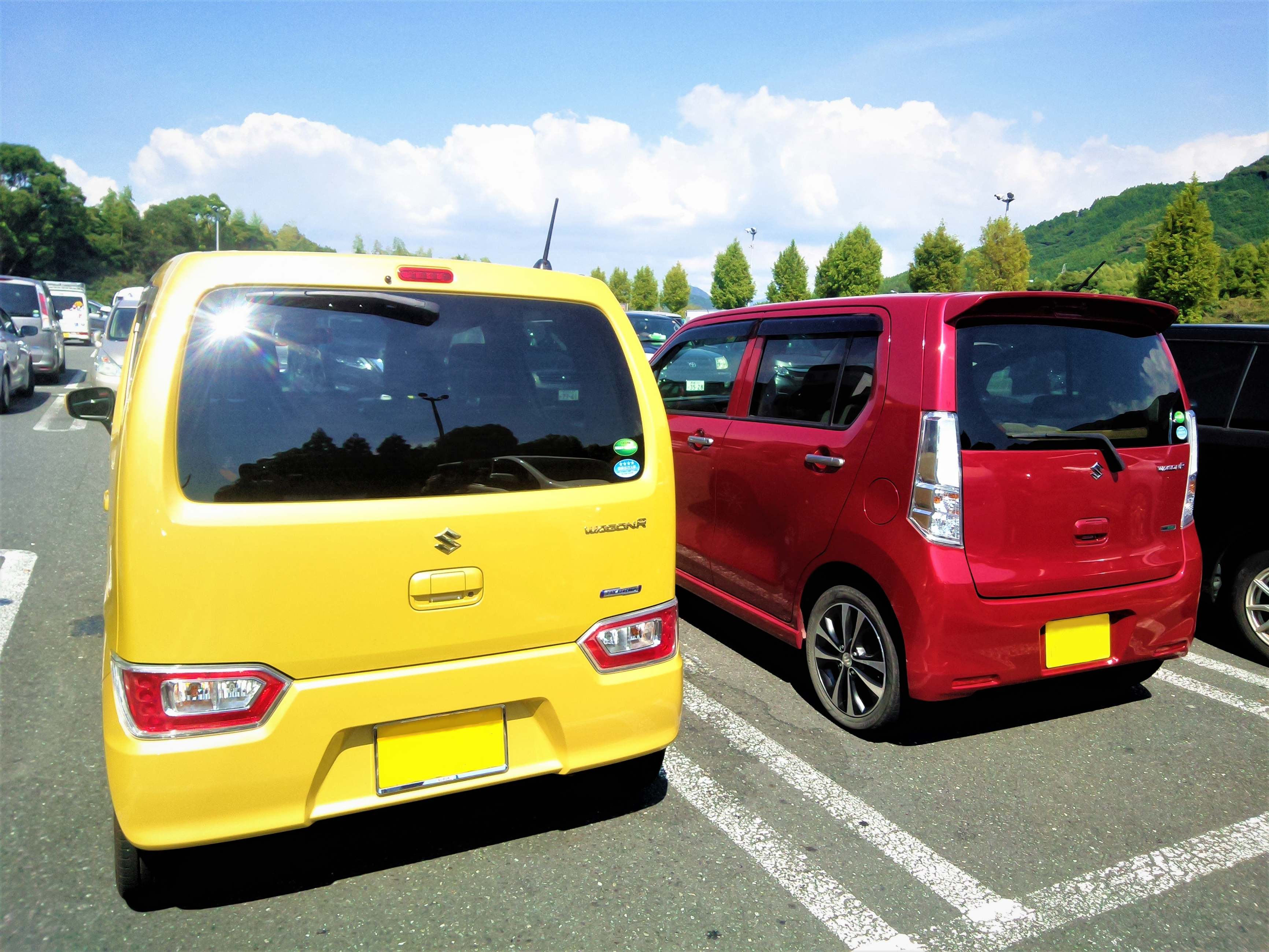 5代目と6代目の比較